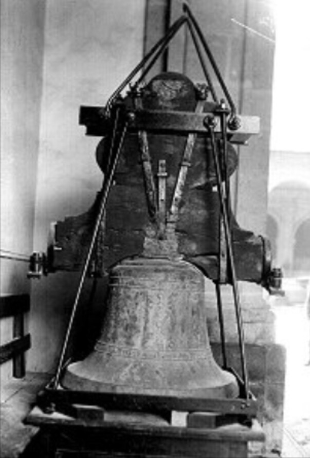 Campana de Dolores, repicada durante el Grito de Dolores por Miguel Hidalgo y Costilla, iniciando así la Guerra de Independencia de México.